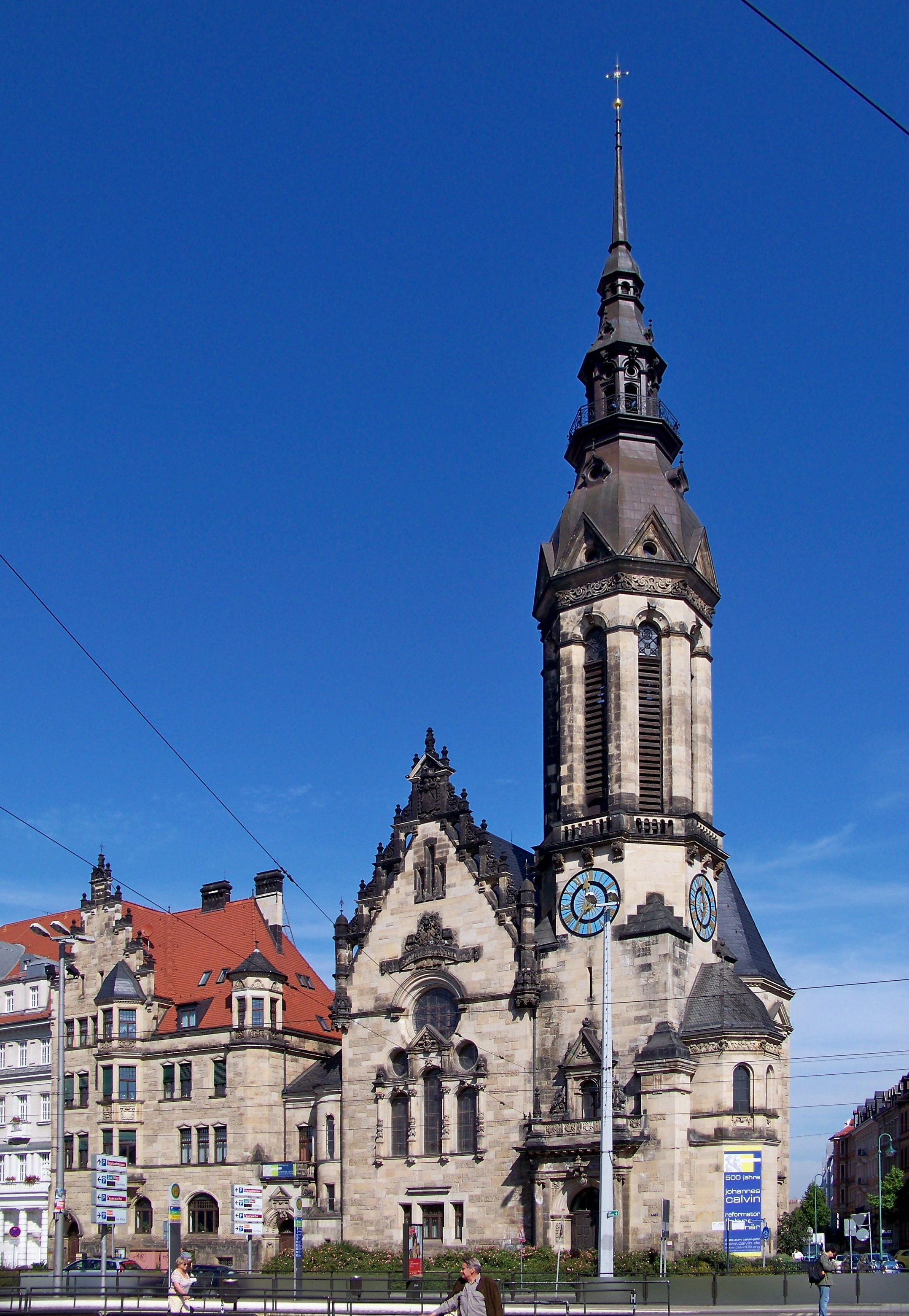 Evangelisch-reformierte Kirche am Tröndlinring / Ecke Löhrstraße in Leipzig